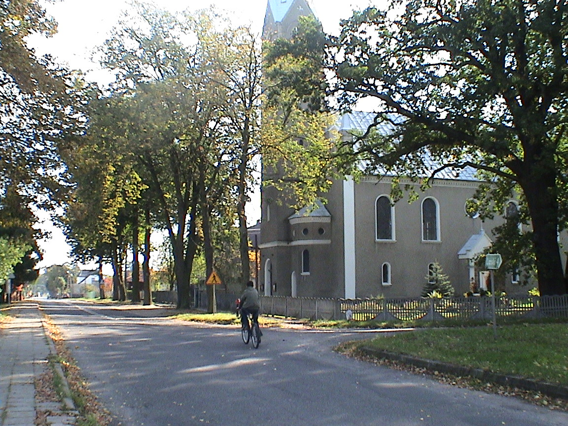 Calle ubicada al frente de la Iglesia de Nietków